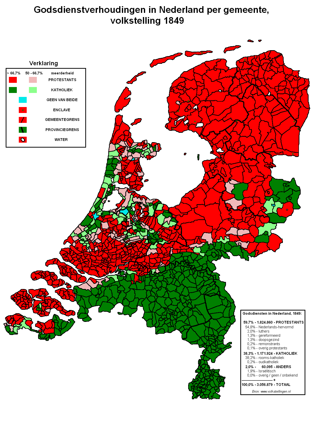 Kaart van Nederland met godsdienstverhoudingen per gemeente bij de volkstelling van 1849